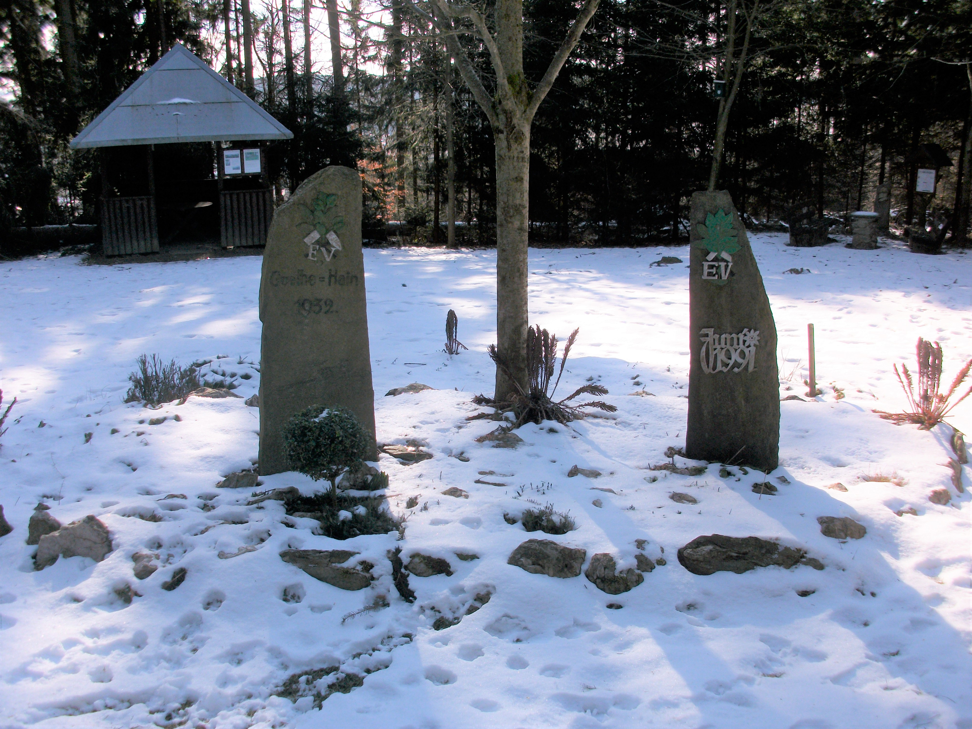 Goethehain Gornsdorf